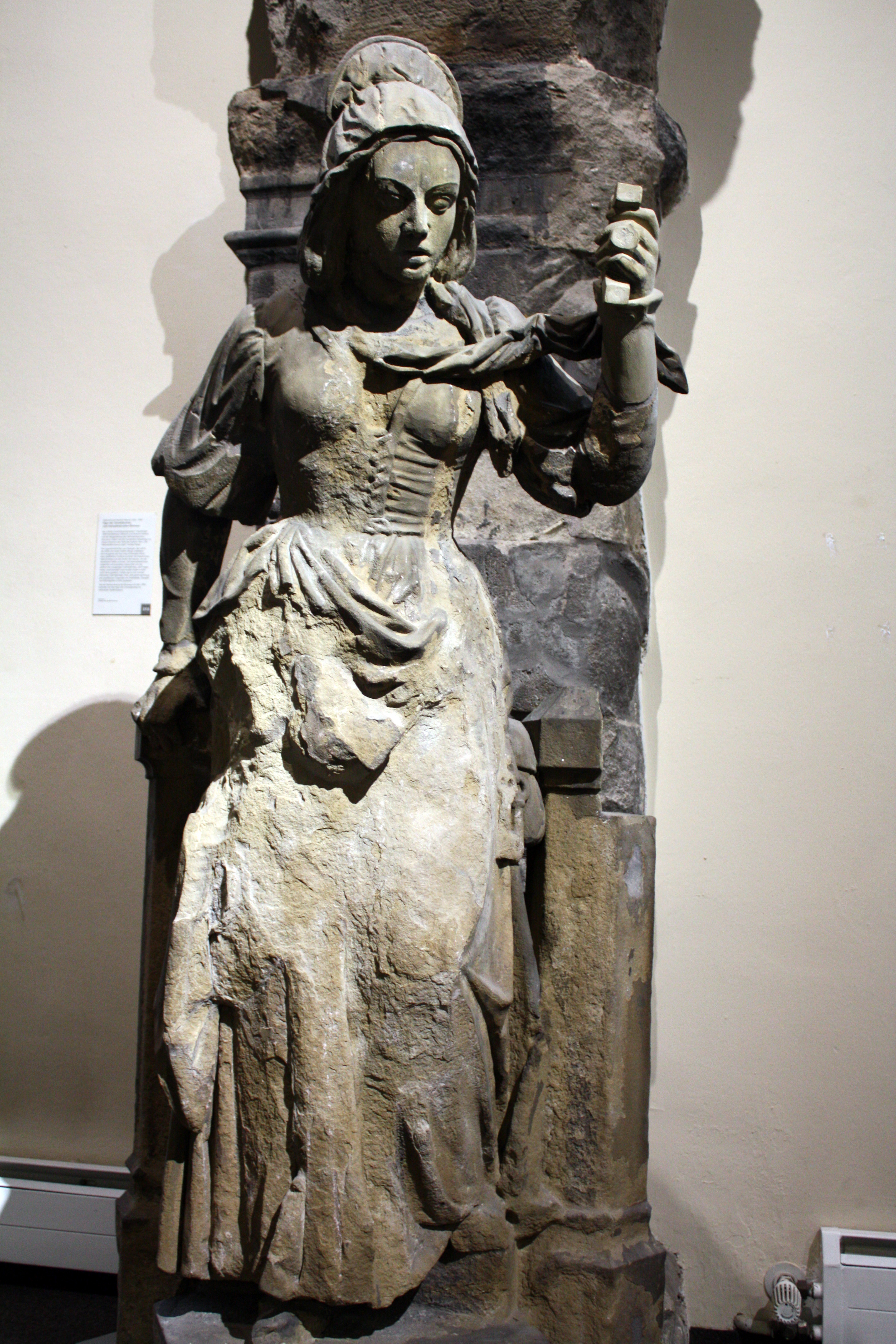 Heinzelmännchenbrunnen Köln, erbaut 1897 bis 1900 nach Plänen von Edmund und Heinrich Renard. Originalskulptur im Stadtmuseum Köln.